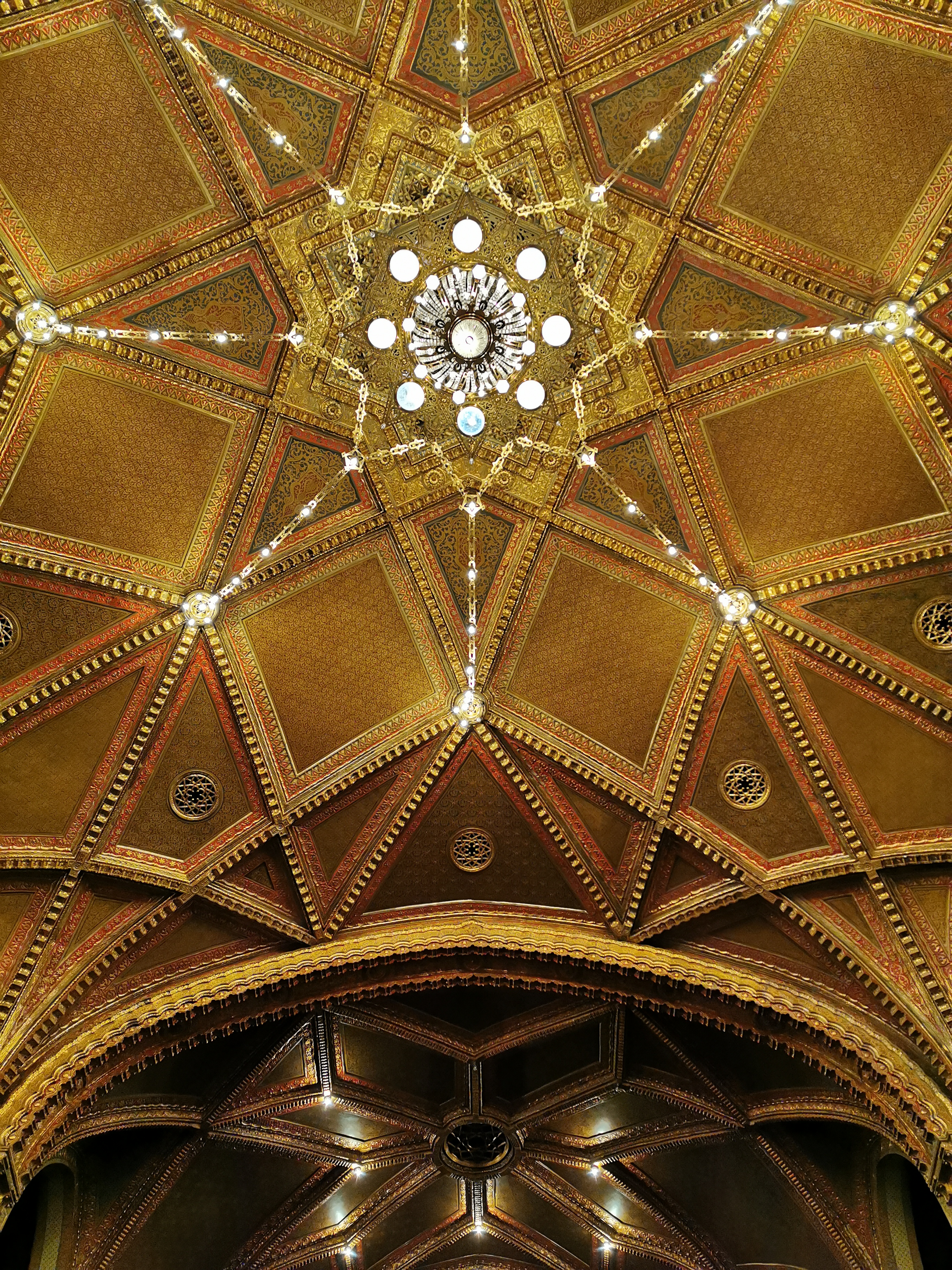 Uránia Nemzeti Filmszínház - mennyezet